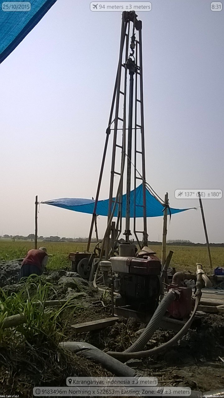 Pembangunan sumur bor untuk irigasi